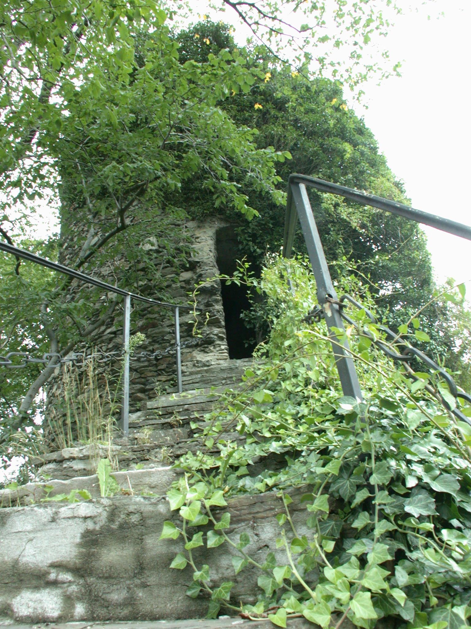 Alter Turm, Schloss Neuweilnau, Weilrod, Deutschland